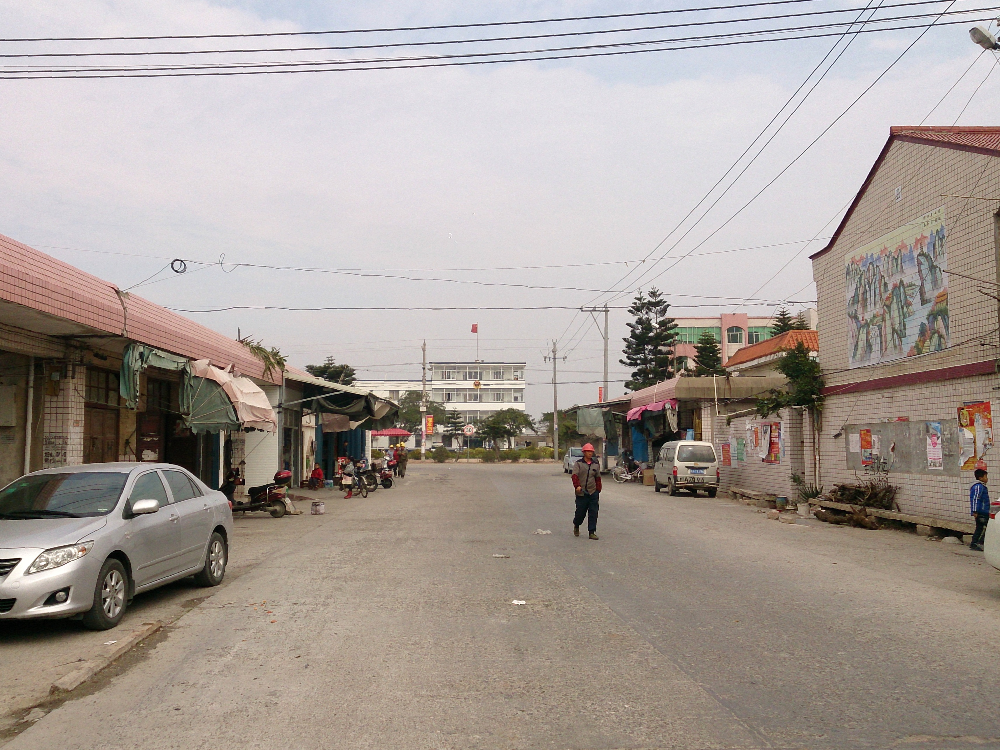 江境华侨农场 - Jiangjing Huaqiao Farm - 2015.01